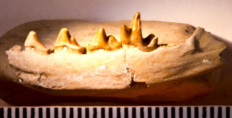 Viverravus lutosus Gazin